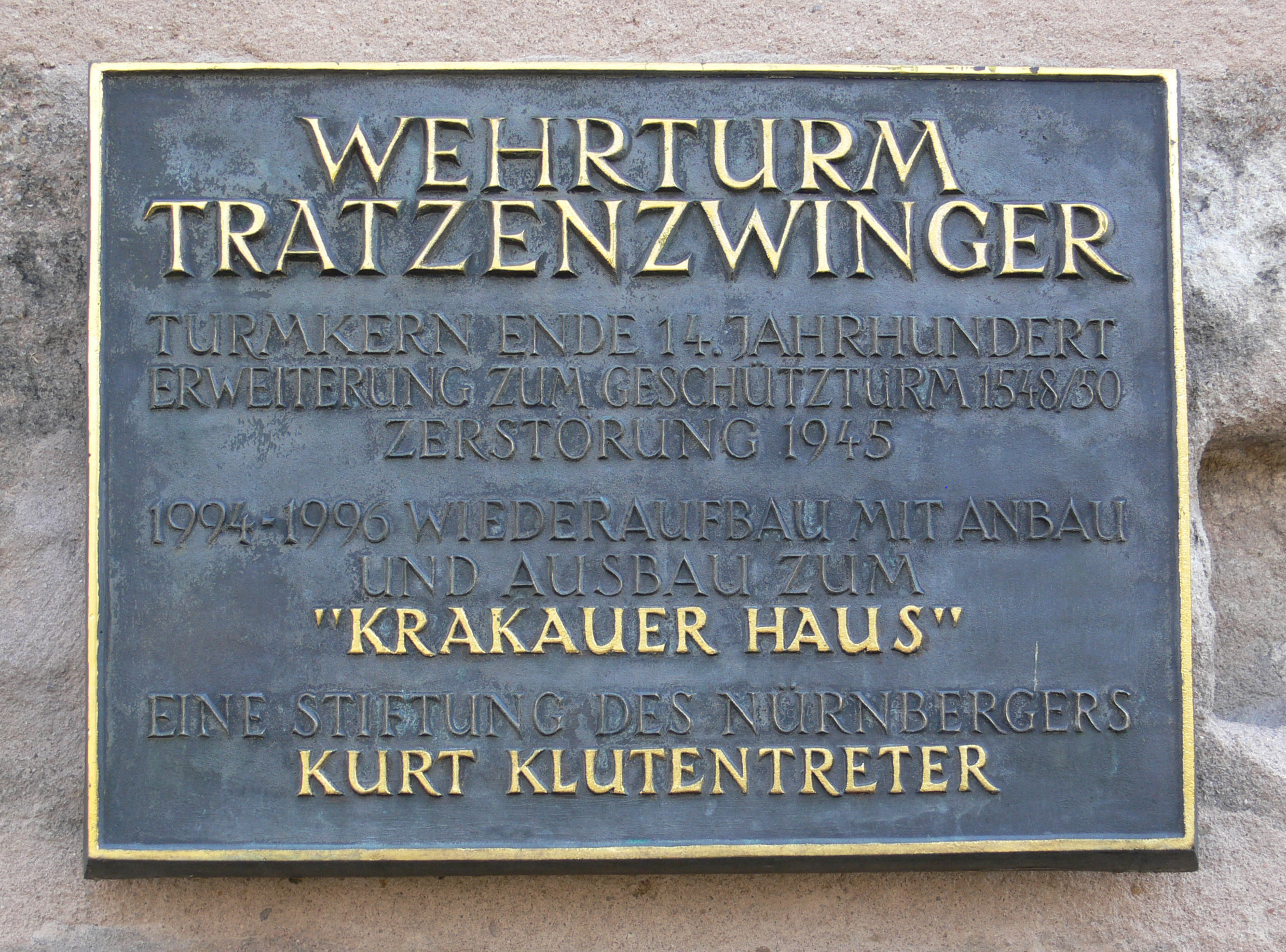 Nürnberg, Hintere Insel Schütt, Turm Schwarzes Z (Hintere Insel Schütt Nr. 34), auch „Krakauer Haus“ genannt, einer der beiden „Wehrtürme am Tratzenzwinger“, Stadtseite, Tafel